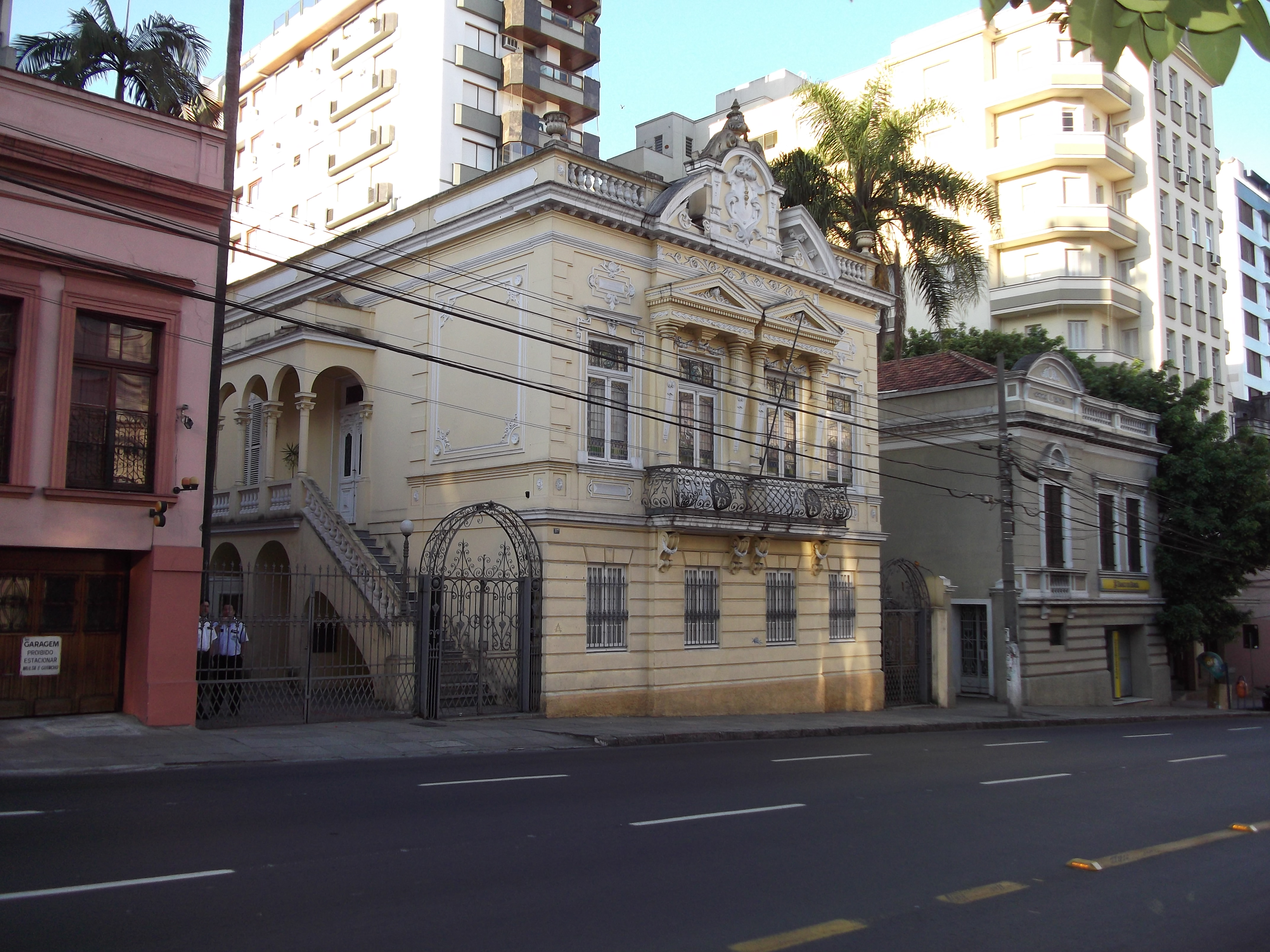 Avenida Independencia, 867 - Porto Alegre, Brasil